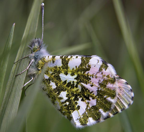 Aurorafalter (anthocharis cardamines), aufgenommen am Waldrand in der Nähe von Oppenrod